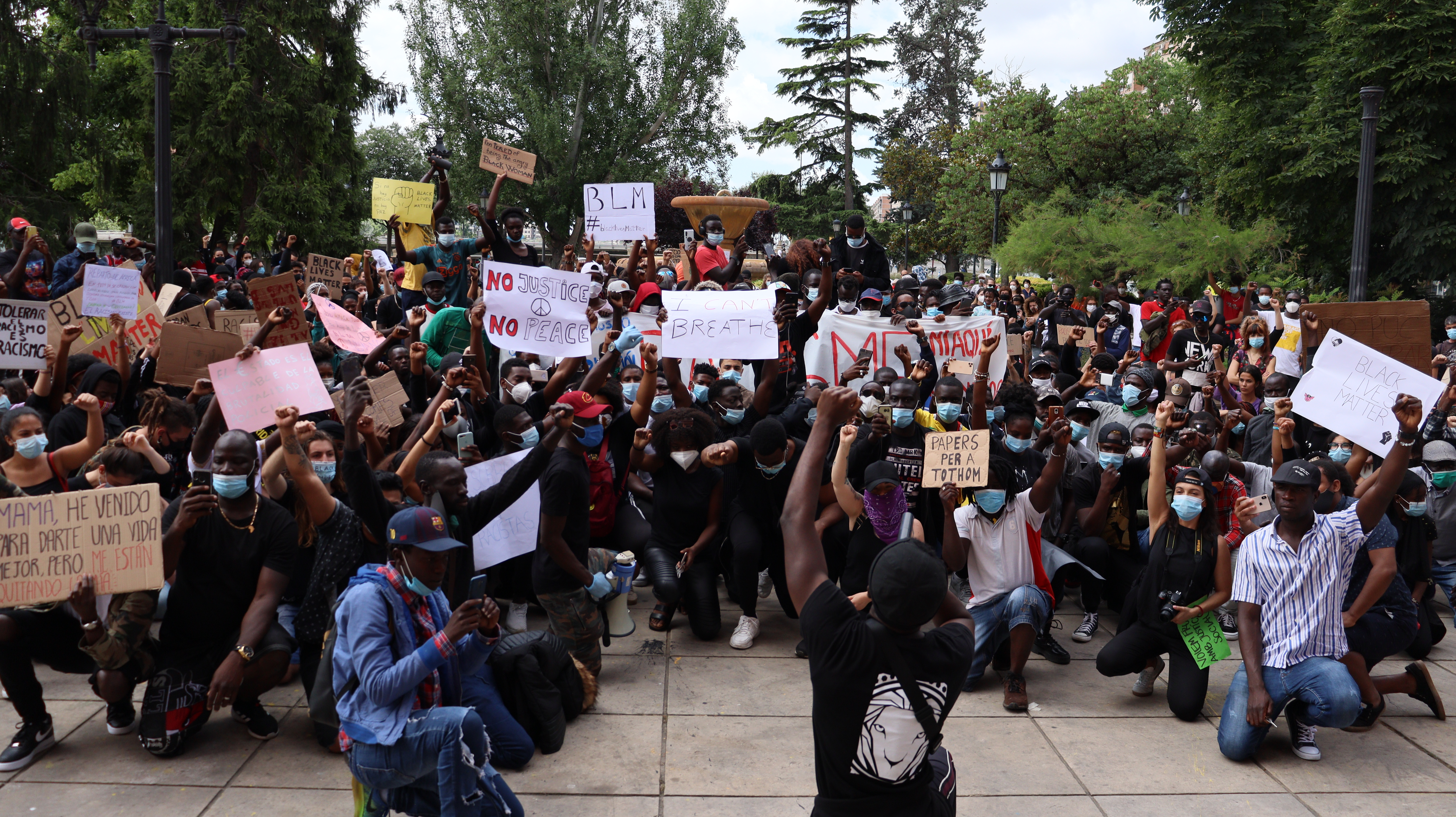 Manifestació en memòria de George Floyd i en contra del racisme a la ciutat de Lleida.